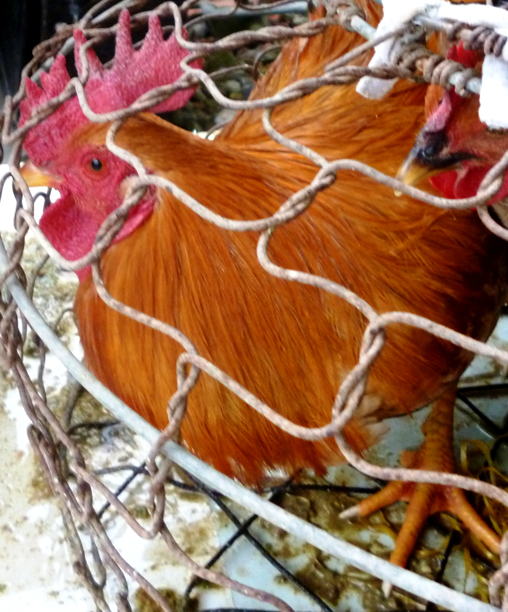 Hình chụp về con gà Tàu vàng (con trống)